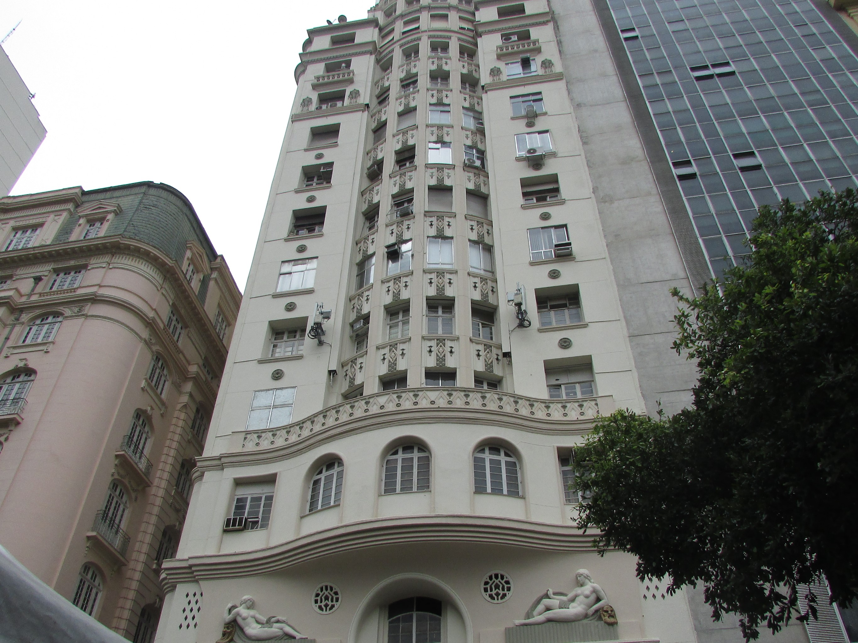 Edificação do antigo Pathé Palace atualmente (2019).